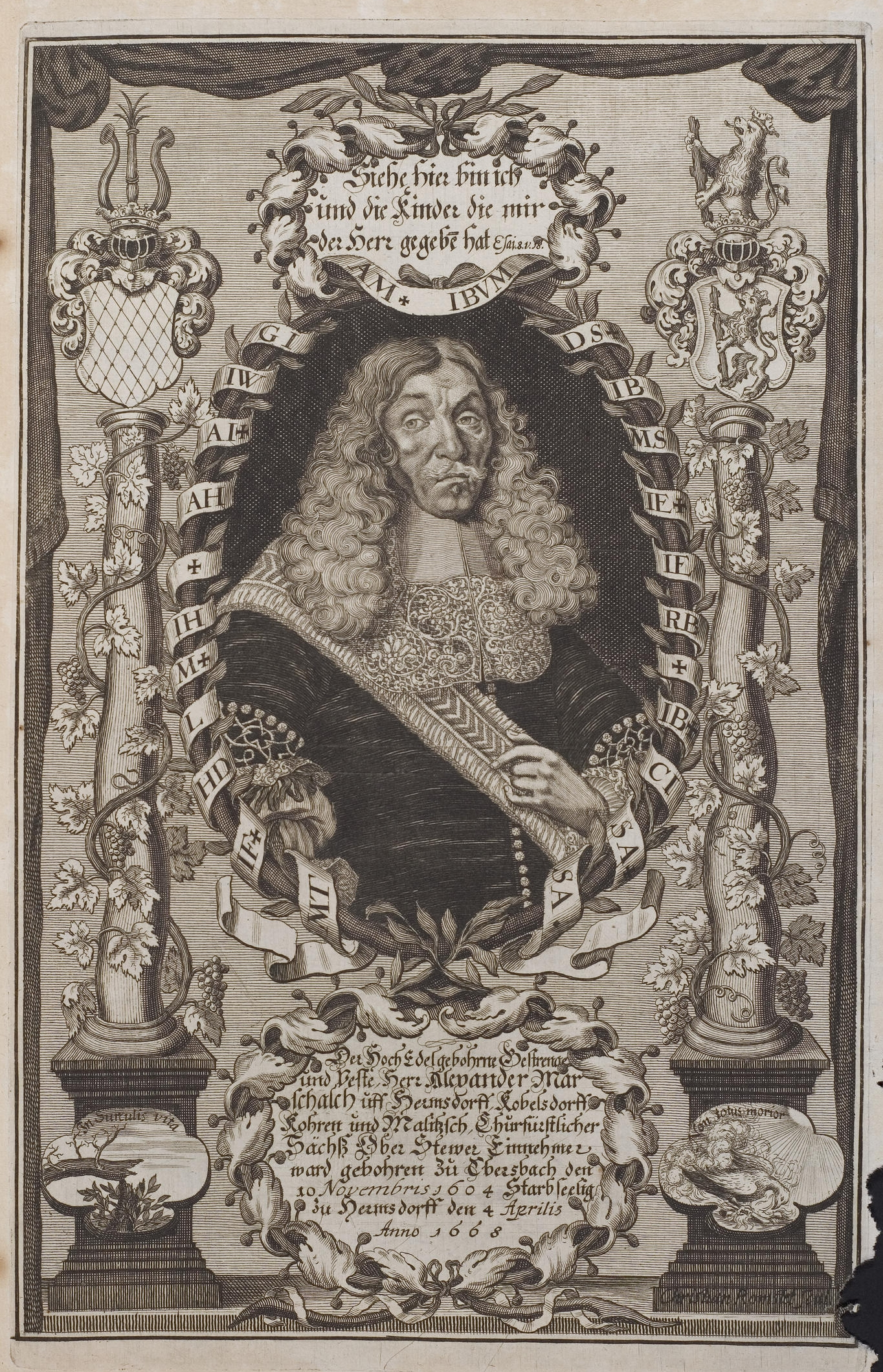 Grafik aus dem Klebeband Nr. 2 der Fürstlich Waldeckschen Hofbibliothek Arolsen Motiv: Alexander Marschall von Bieberstein (1604–1668), Kurfürstl. Sächs. Ober-Steuer-Einnehmer